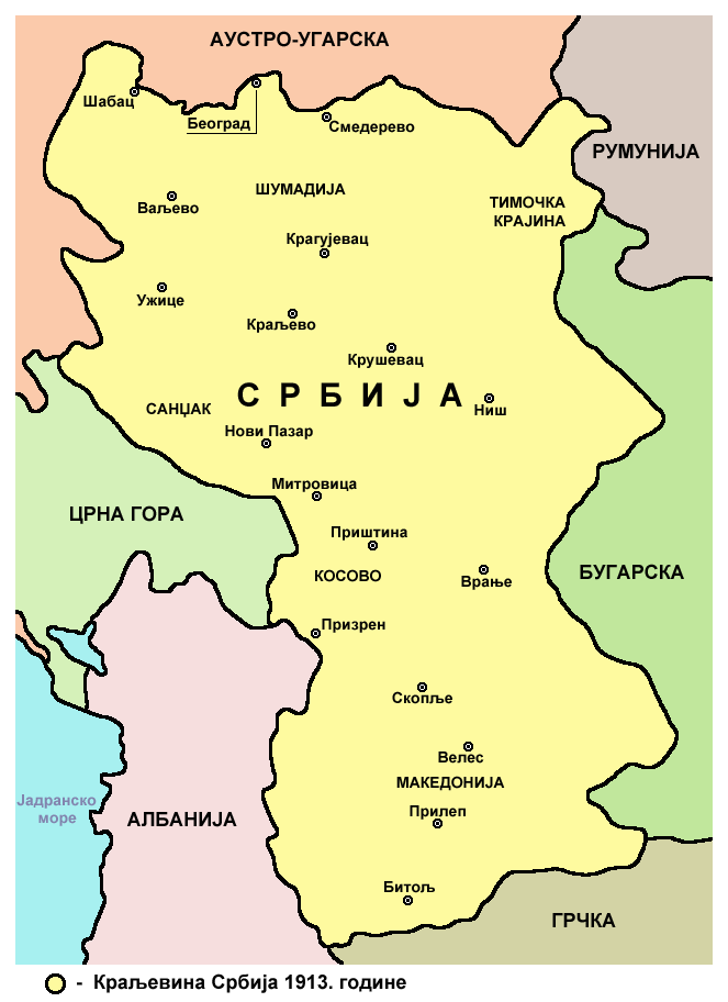 Краљевина Србија 1913. године.